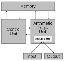 архитектура на Фон Нойман